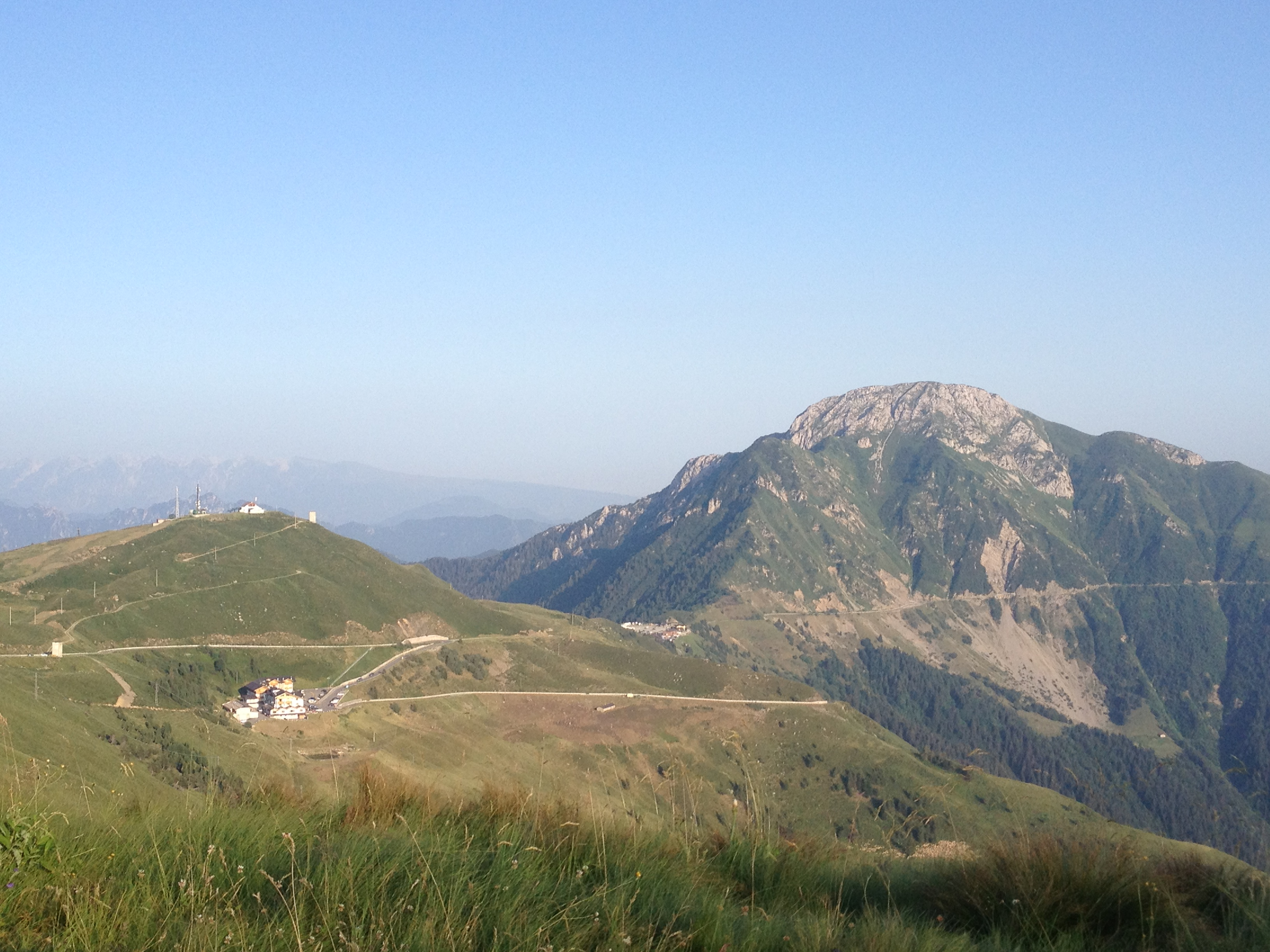 Maniva, Bonardi, Passo Maniva, Dosso Alto e strada per Baremone visti dalla zona Dasdana